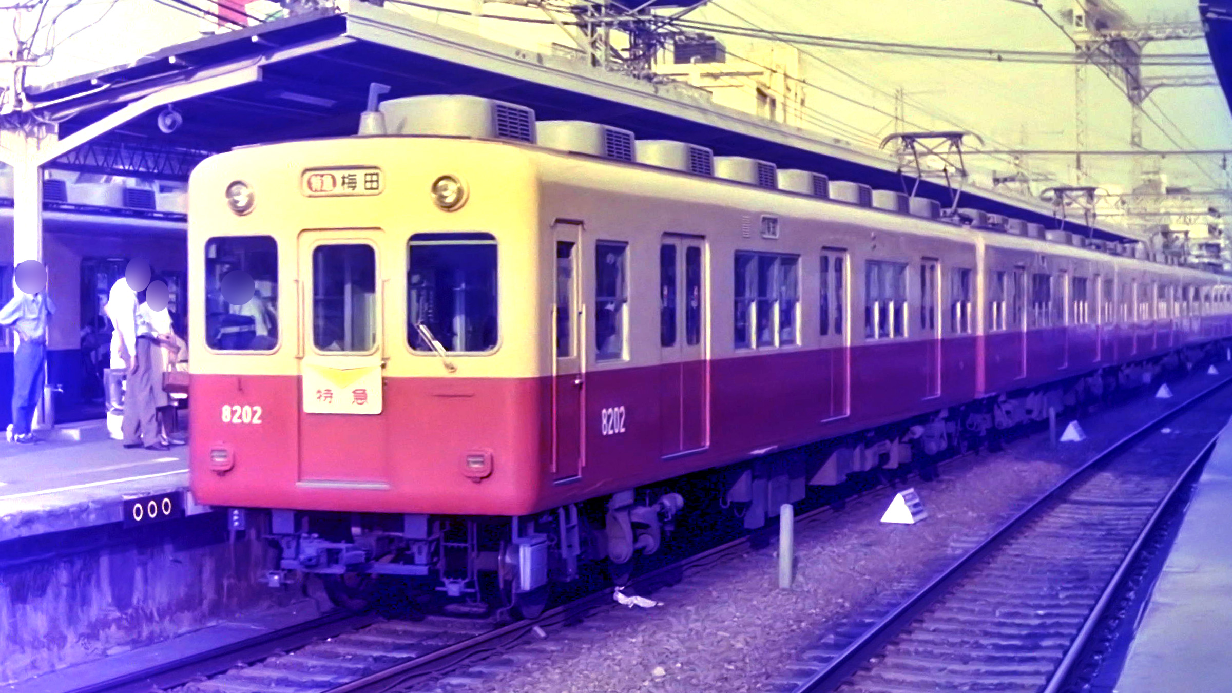 阪神電気鉄道8201 1985年西宮駅